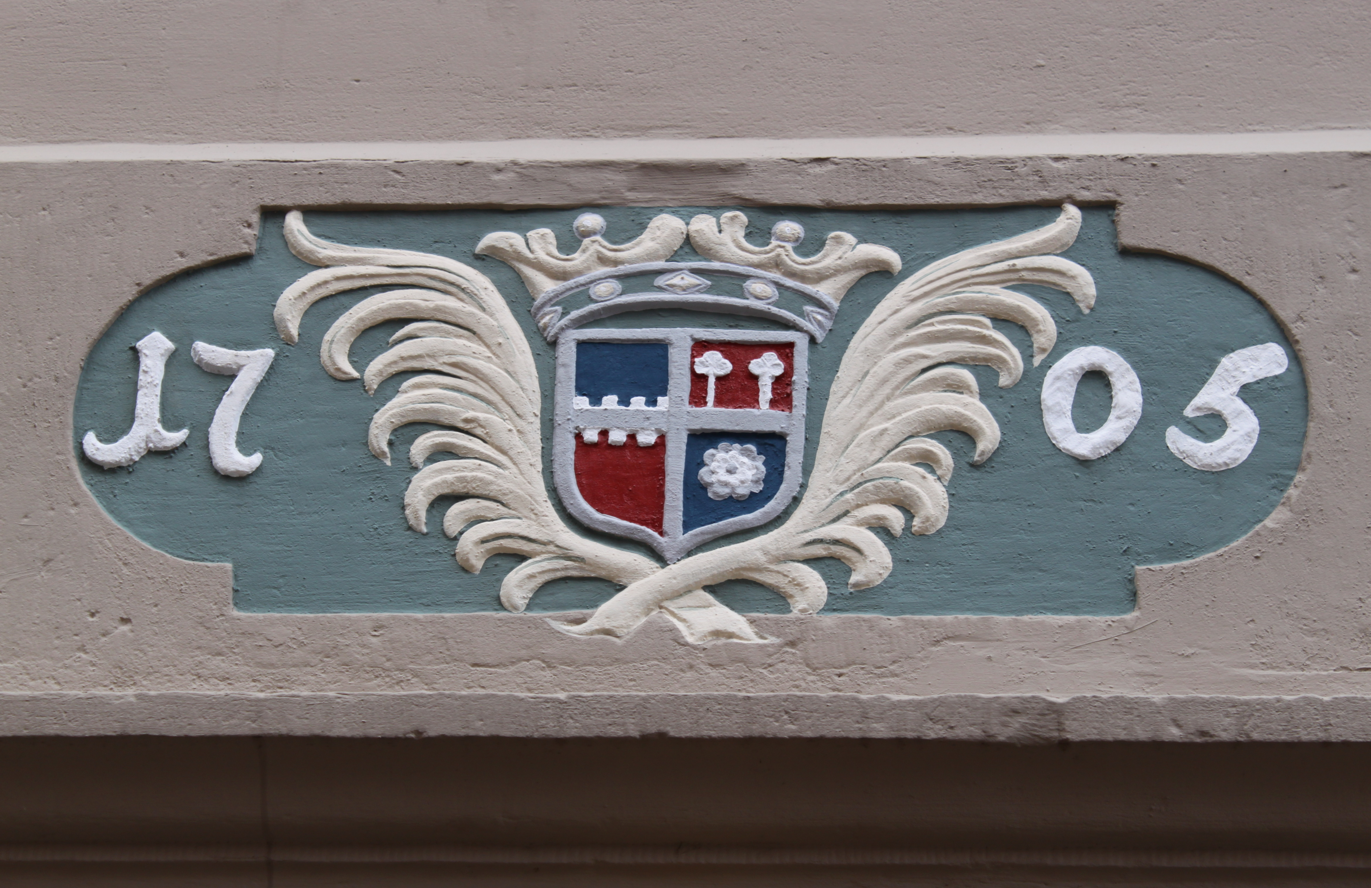 Warburg, Kalandstraße 5 (ehem. Hirschapotheke)